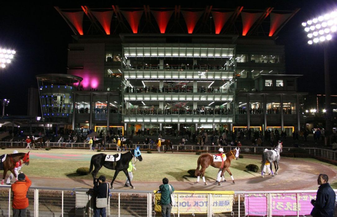 大井競馬場・パドックとL-WING（2005年12月29日撮影） 撮影者:Goki